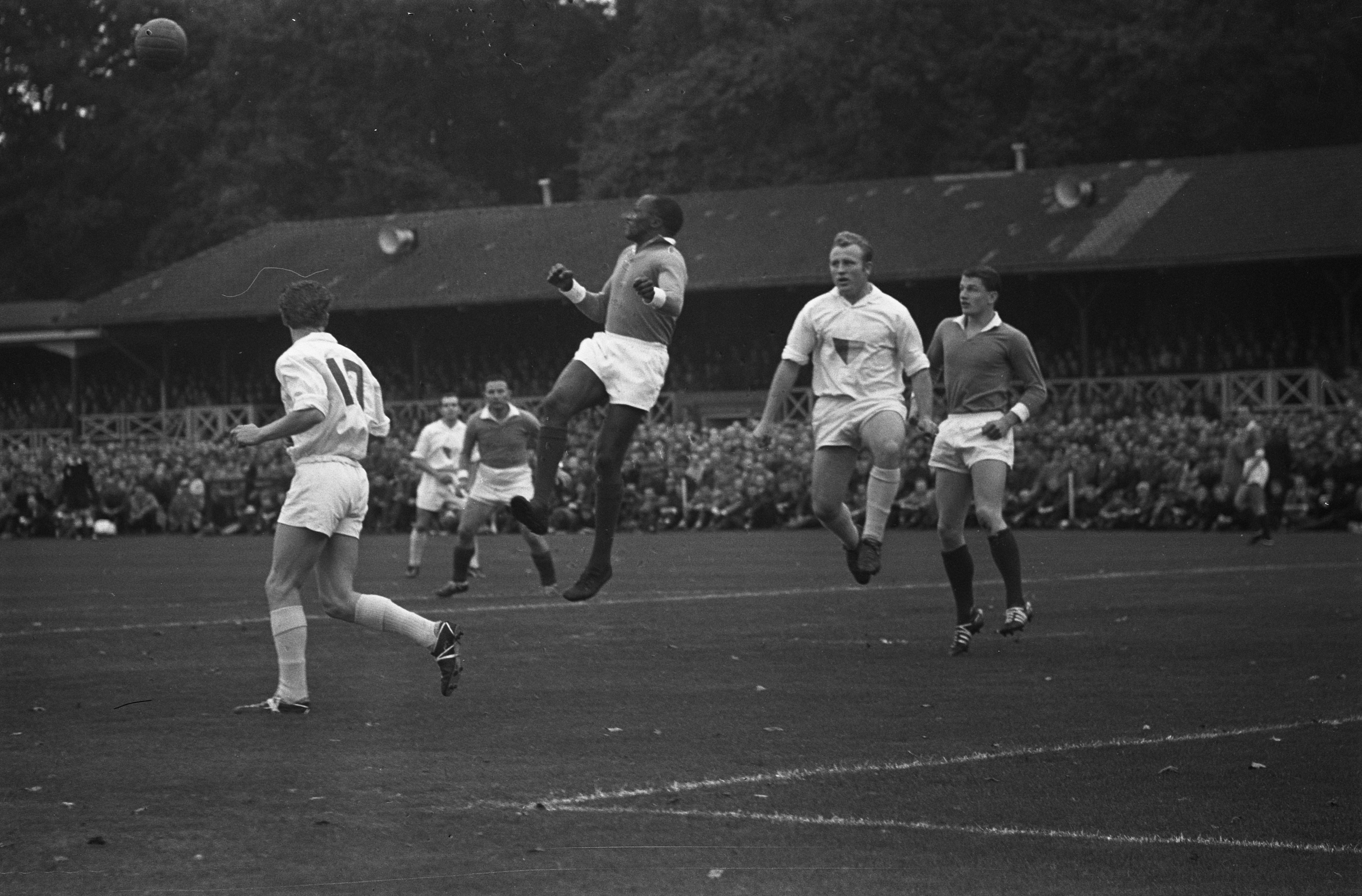 Enschedese Boys tegen Go Ahead 3-2, v.l.n.r. Veiffer (GA), Lenstra (EB), Dhlomo (EB), Bleyenberg (GA) en Nijsink (EB)